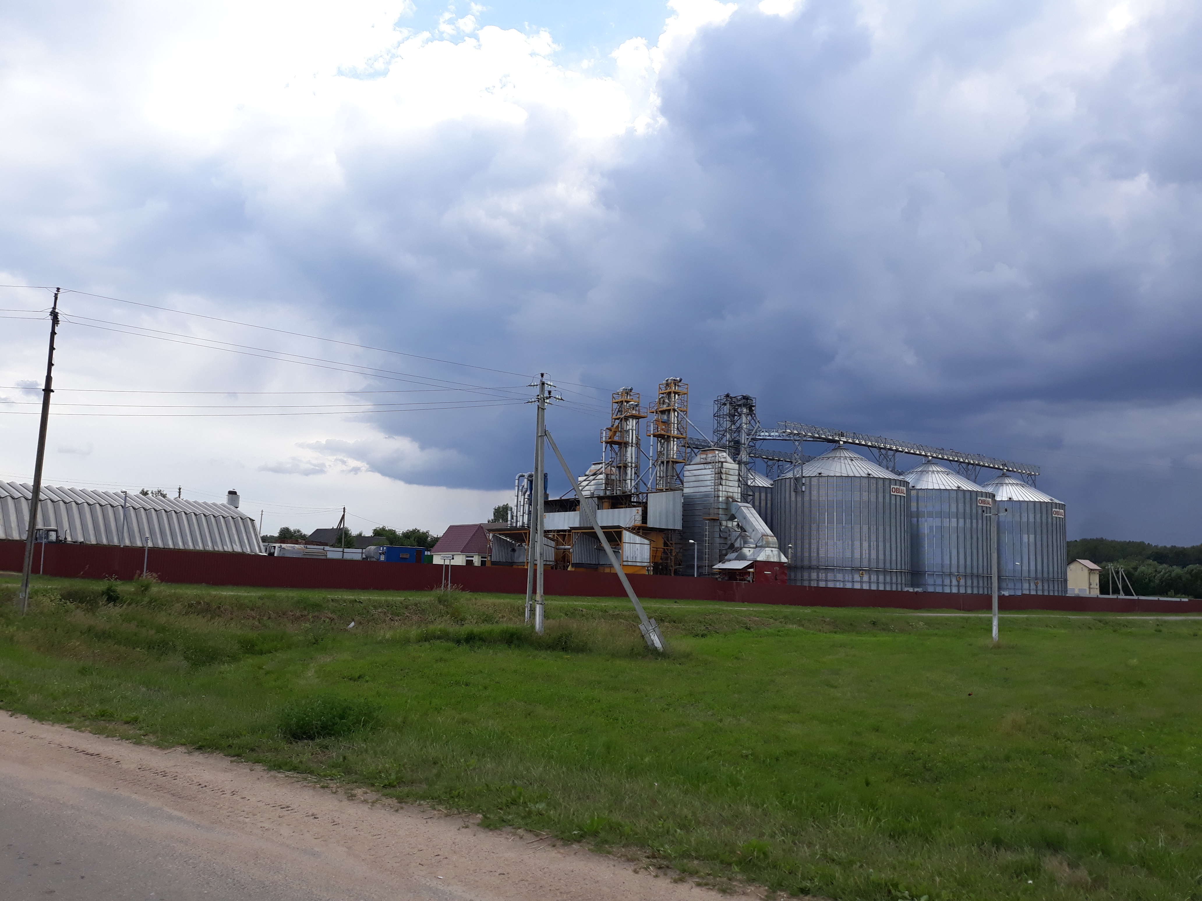 калгас у вёске Кудрышчына. Смалявіцкі раён